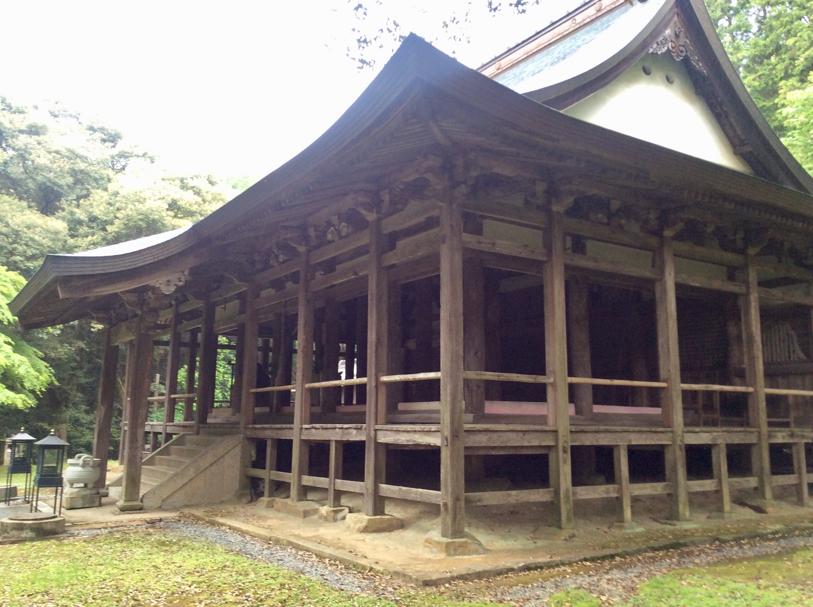 奥山寺本堂